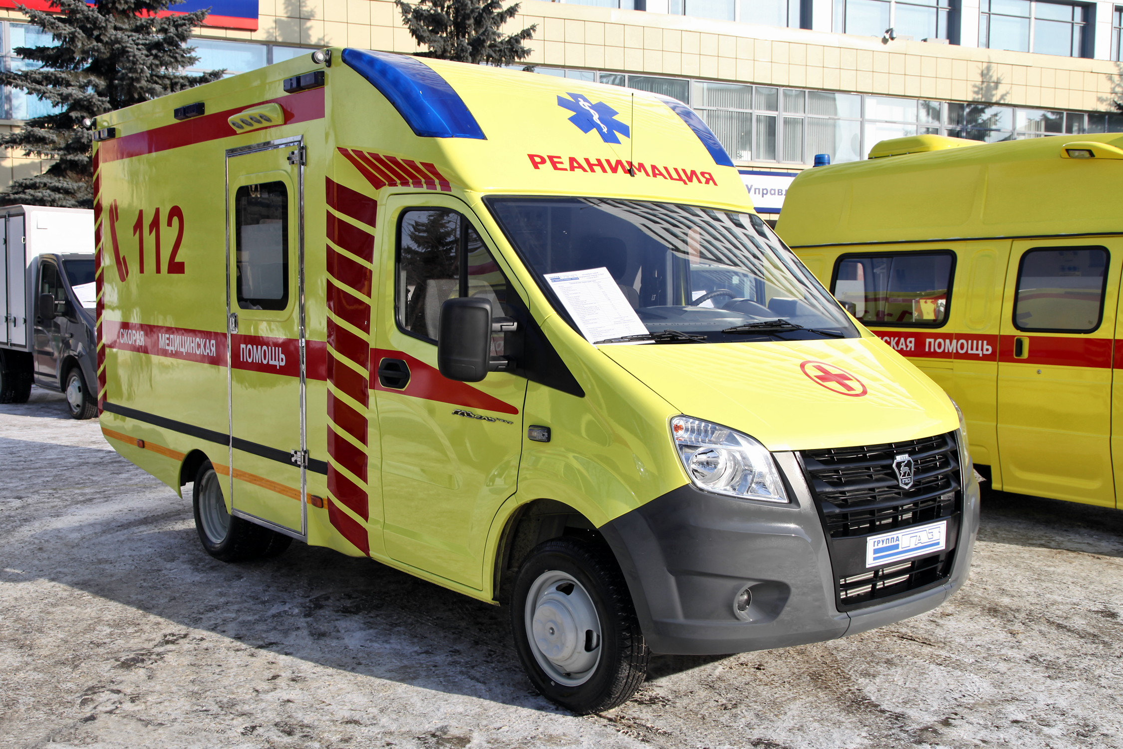 Автомобиль скорой помощи ГАЗ-А21R22 на базе ГАЗель NEXT (Ambulance vehicle GAZ-A21R22 on GAZel NEXT chassis)